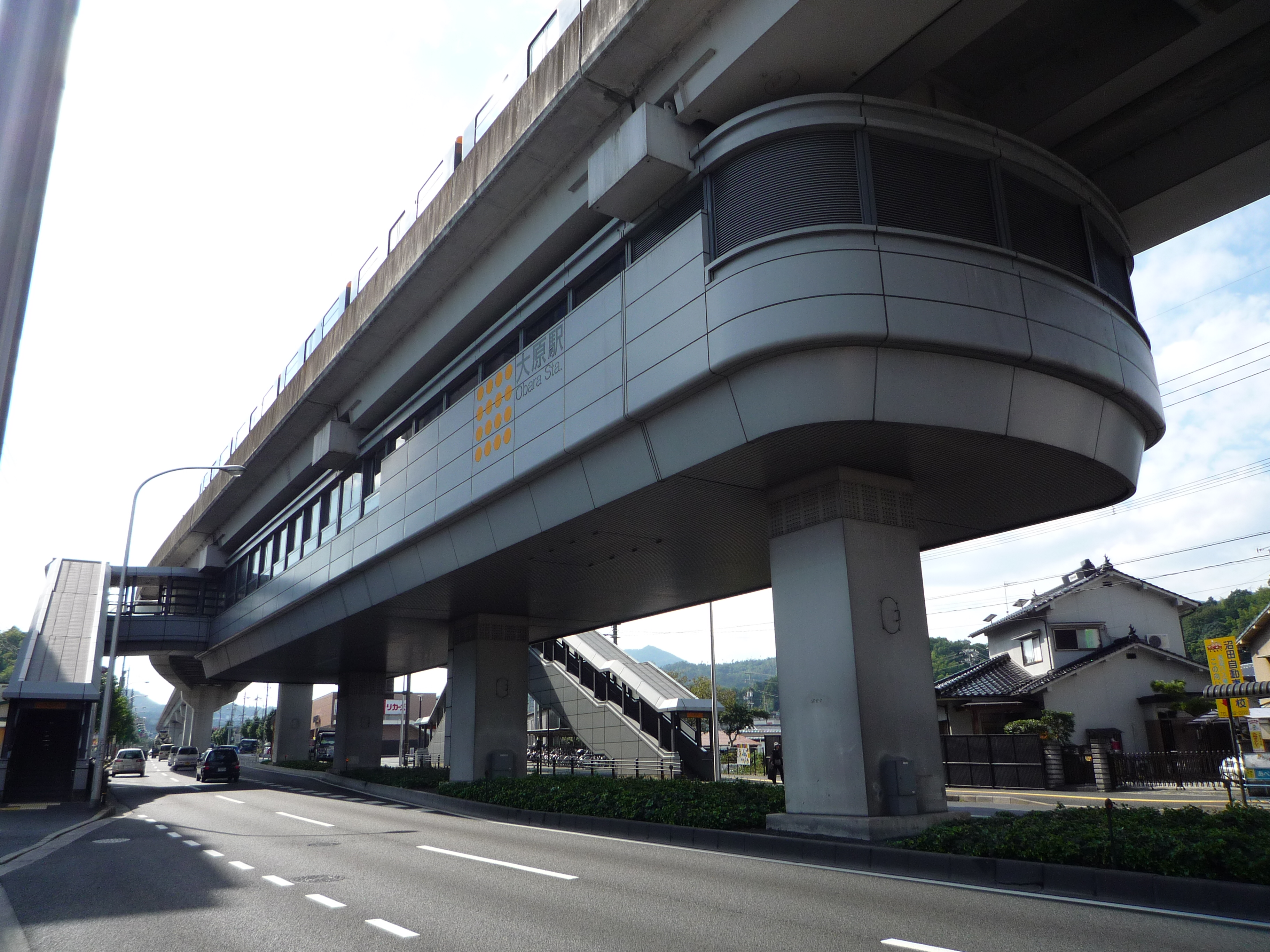 大原駅 (広島県)